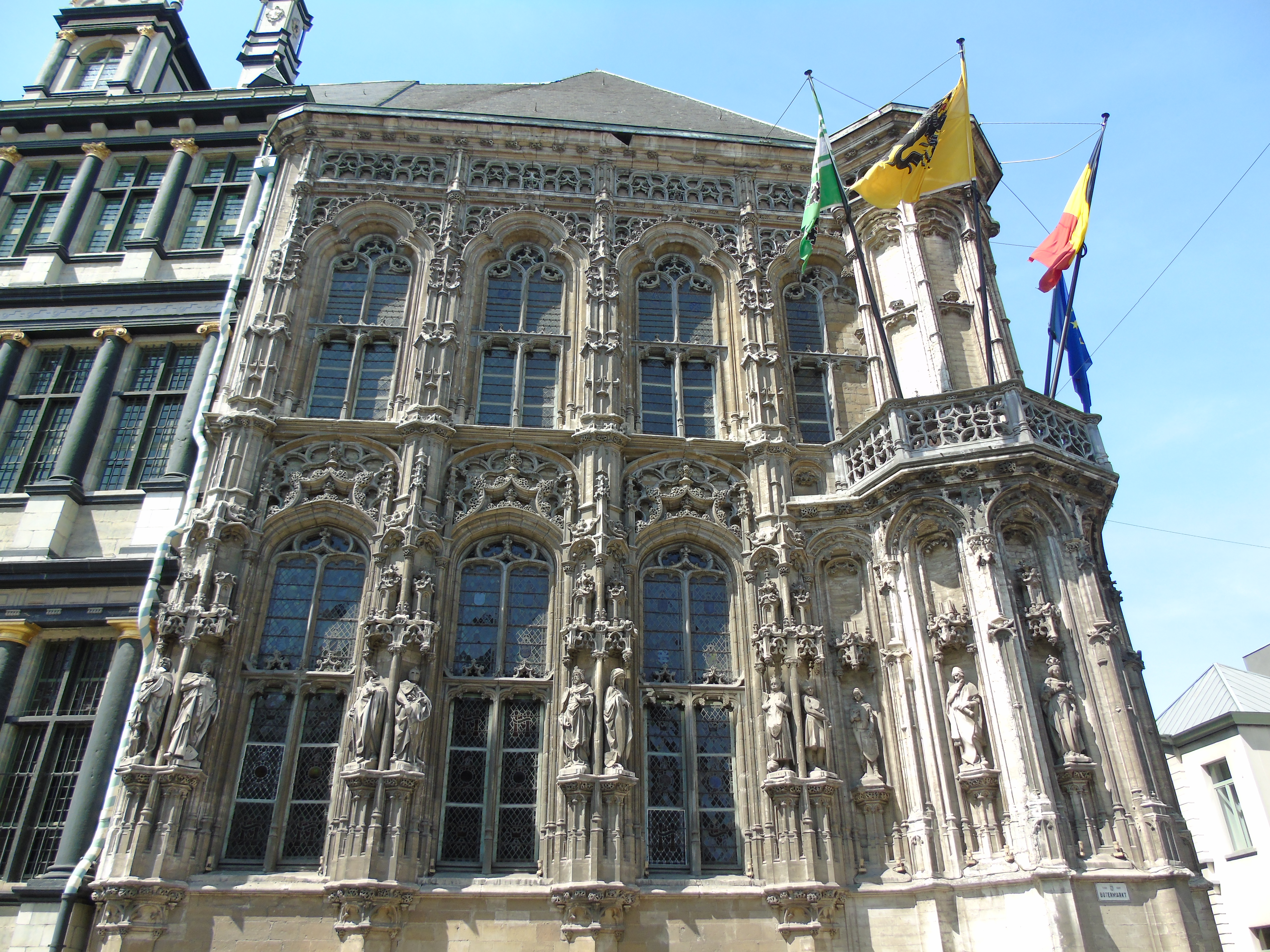 Ayuntamiento de Gante, en Flandes (Bélgica).